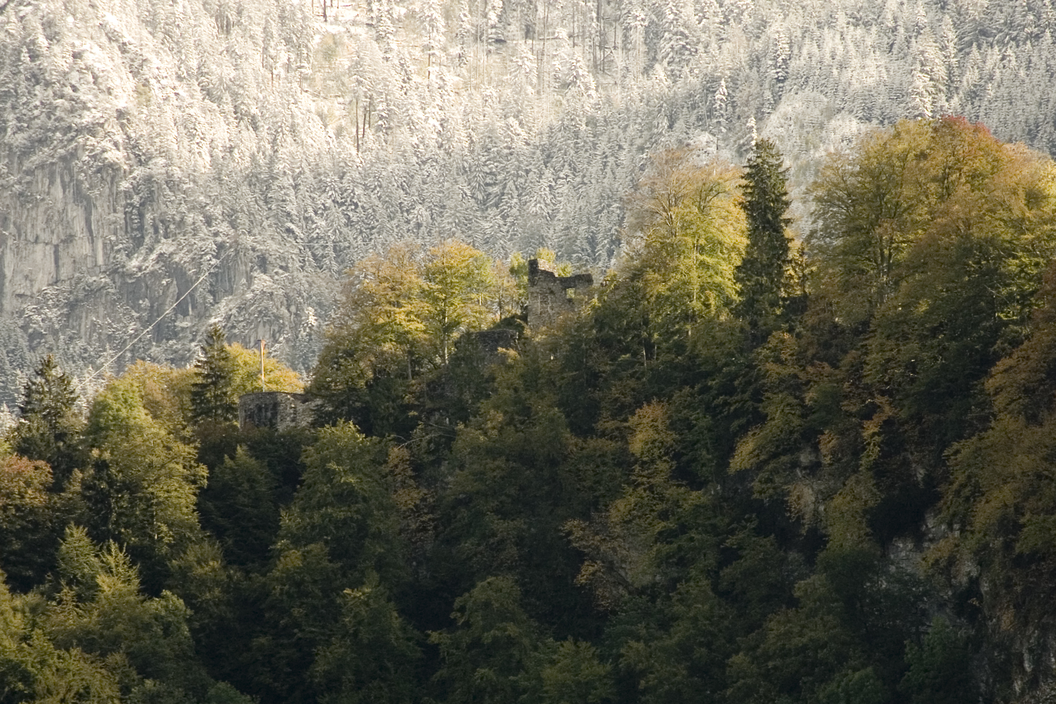 Ruine Alt-Ems - vom Rheintal - Herbst/Winter